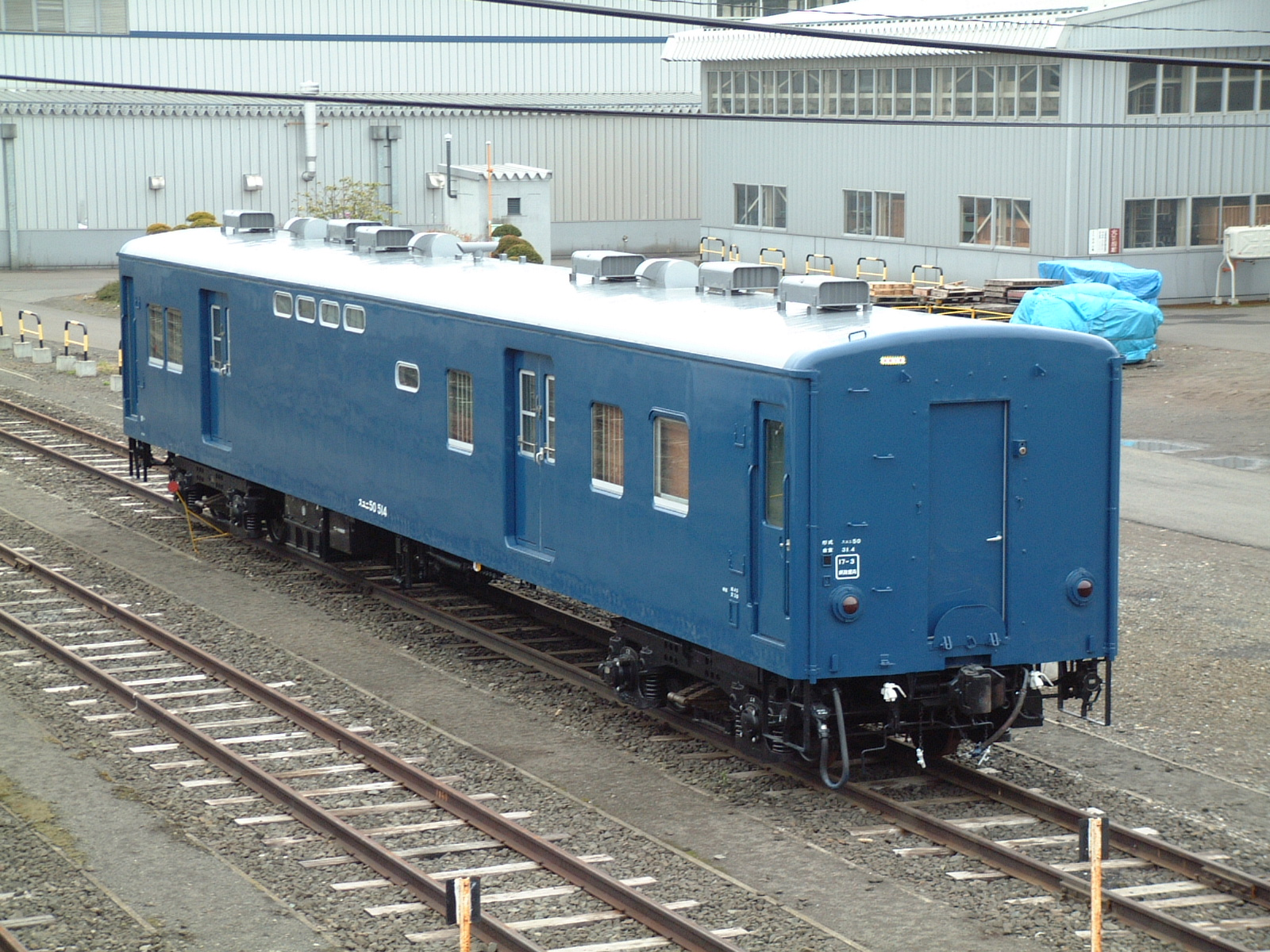 JR北海道釧路運輸車両所に留置中の、スユニ50形郵便荷物（救援車代用）車（スユニ50 514）